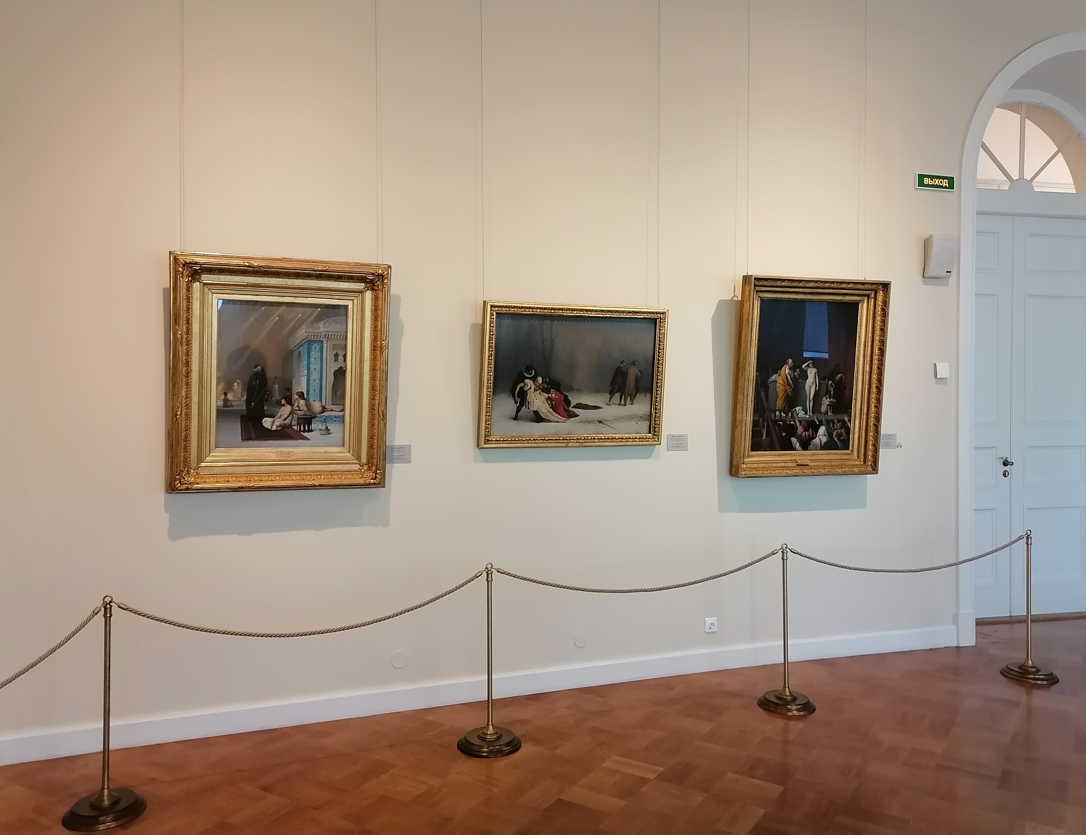 Здание Главного штаба - зал 308 - Жан-Леон Жером "Бассейн в гареме", его же "Дуэль после маскарада", его же "Продажа невольницы"